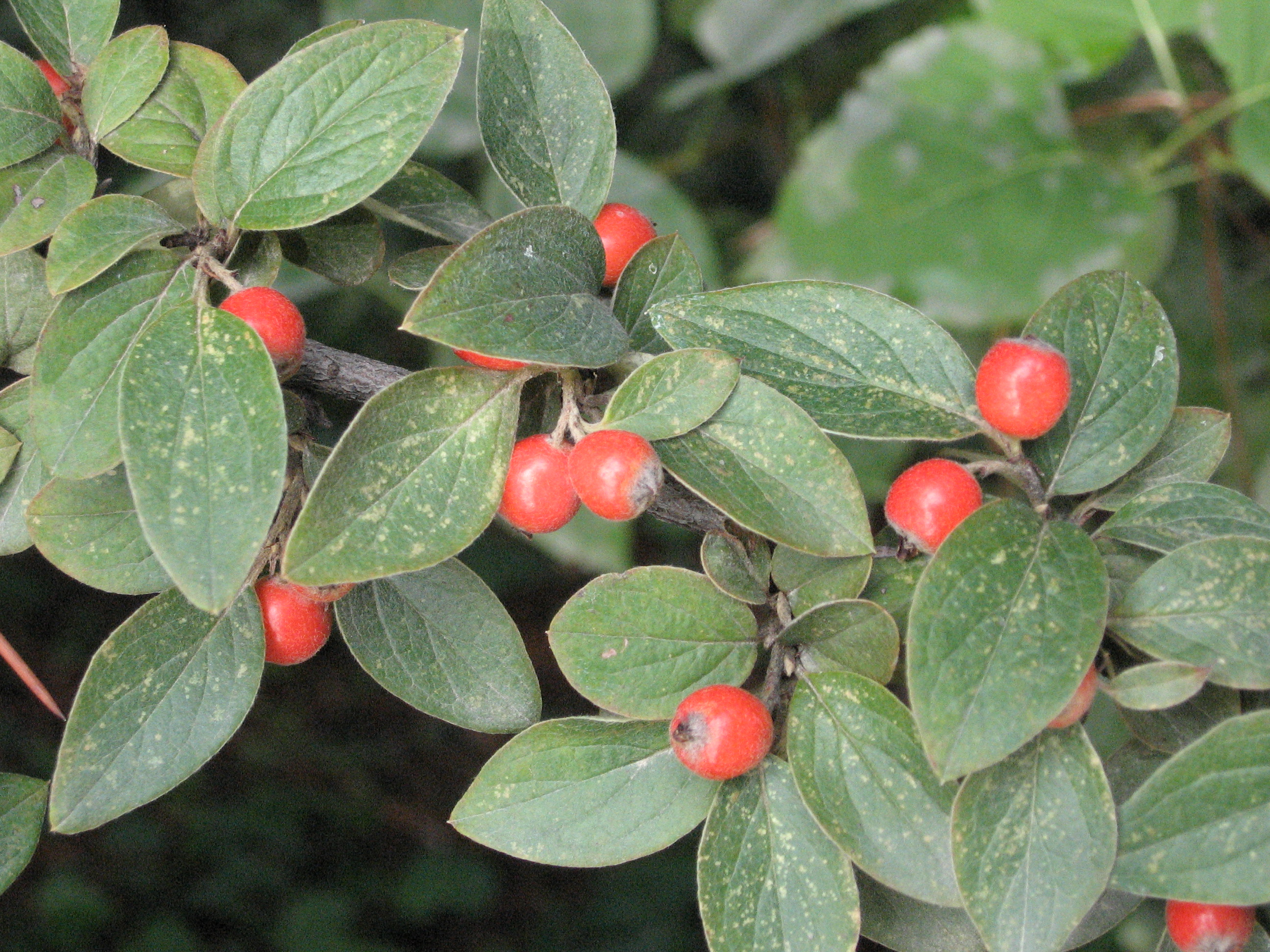 Cotoneaster franchetii. Real Jardín Botánico, Madrid